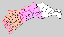 千葉県匝瑳郡の町村。